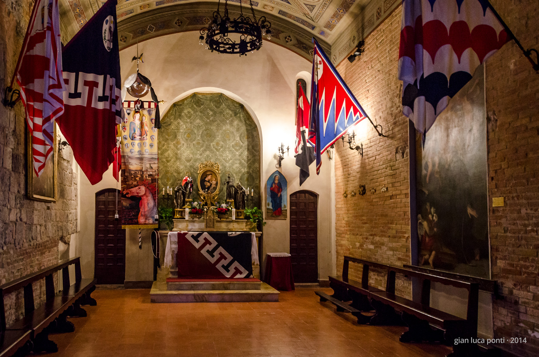 Interno della Chiesa di Sant'Antonio da Padova (Siena), oratorio della Contrada Priora della Civetta. Accanto all'altare è esposto il palio del 16 agosto 2014 dipinto da Ivan Dimitrov.